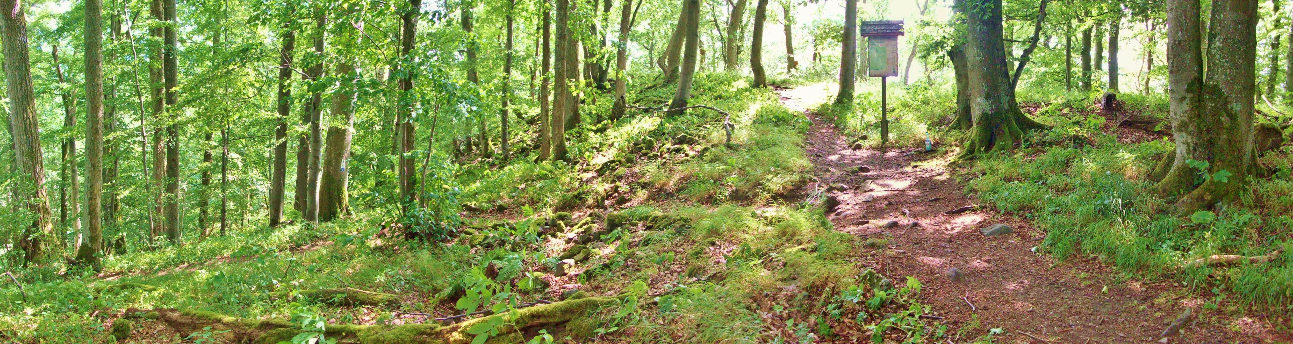 Die Wallanlage auf dem Gangolfsberg: Der vordere Spornbereich, im Bild links (östlich) der steile Aufstieg des Lehrpfades